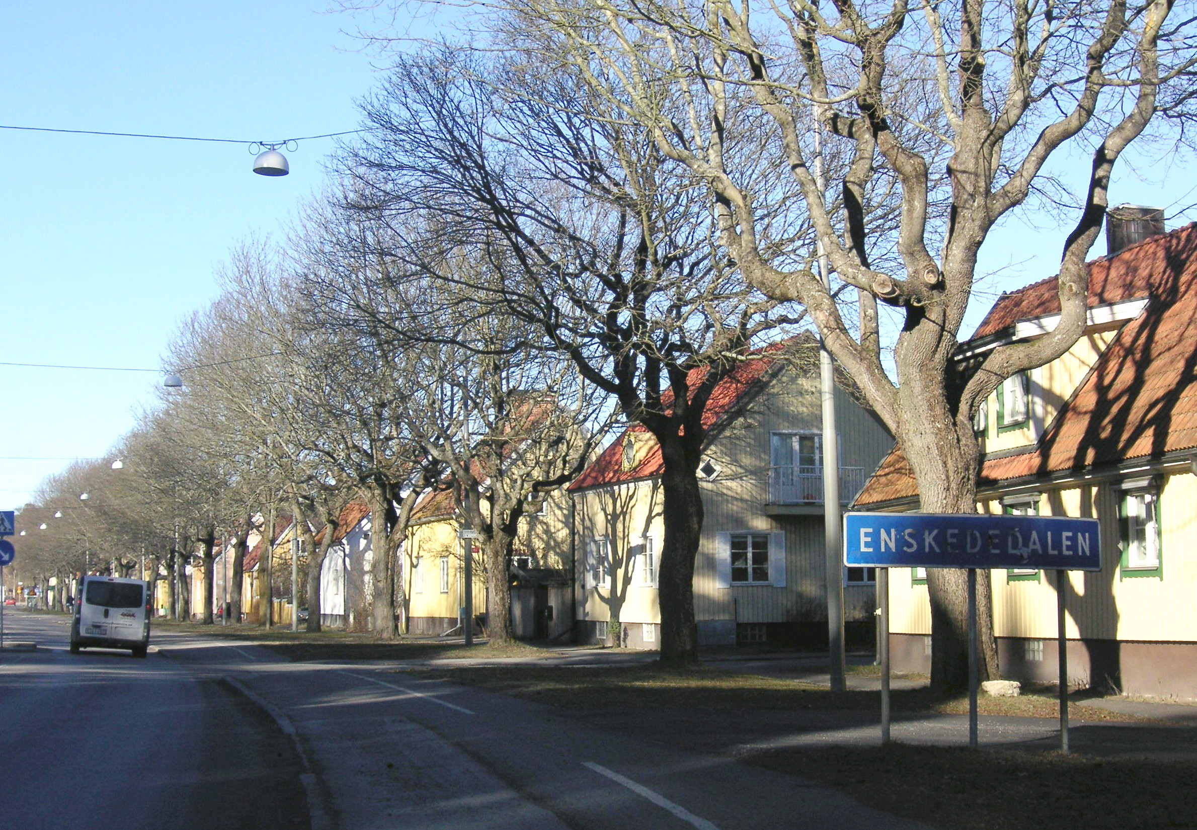 Enskededalen i Stockholm